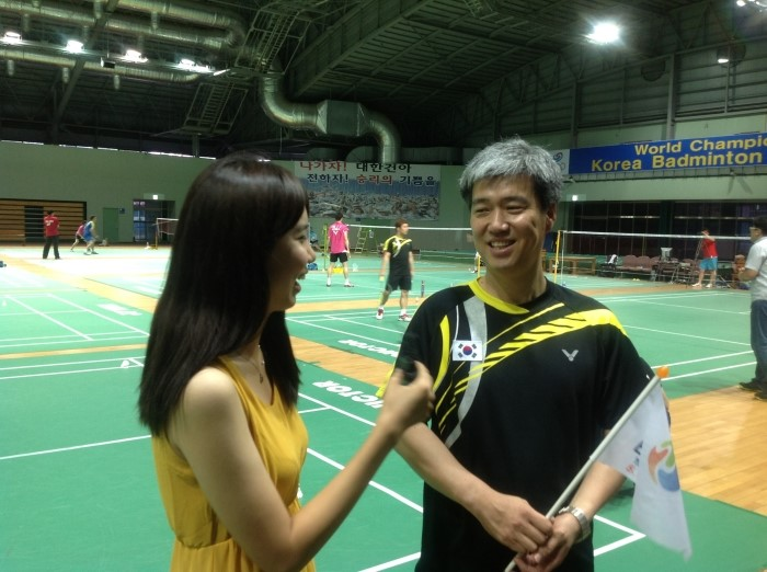 배드민턴 감독 성한국